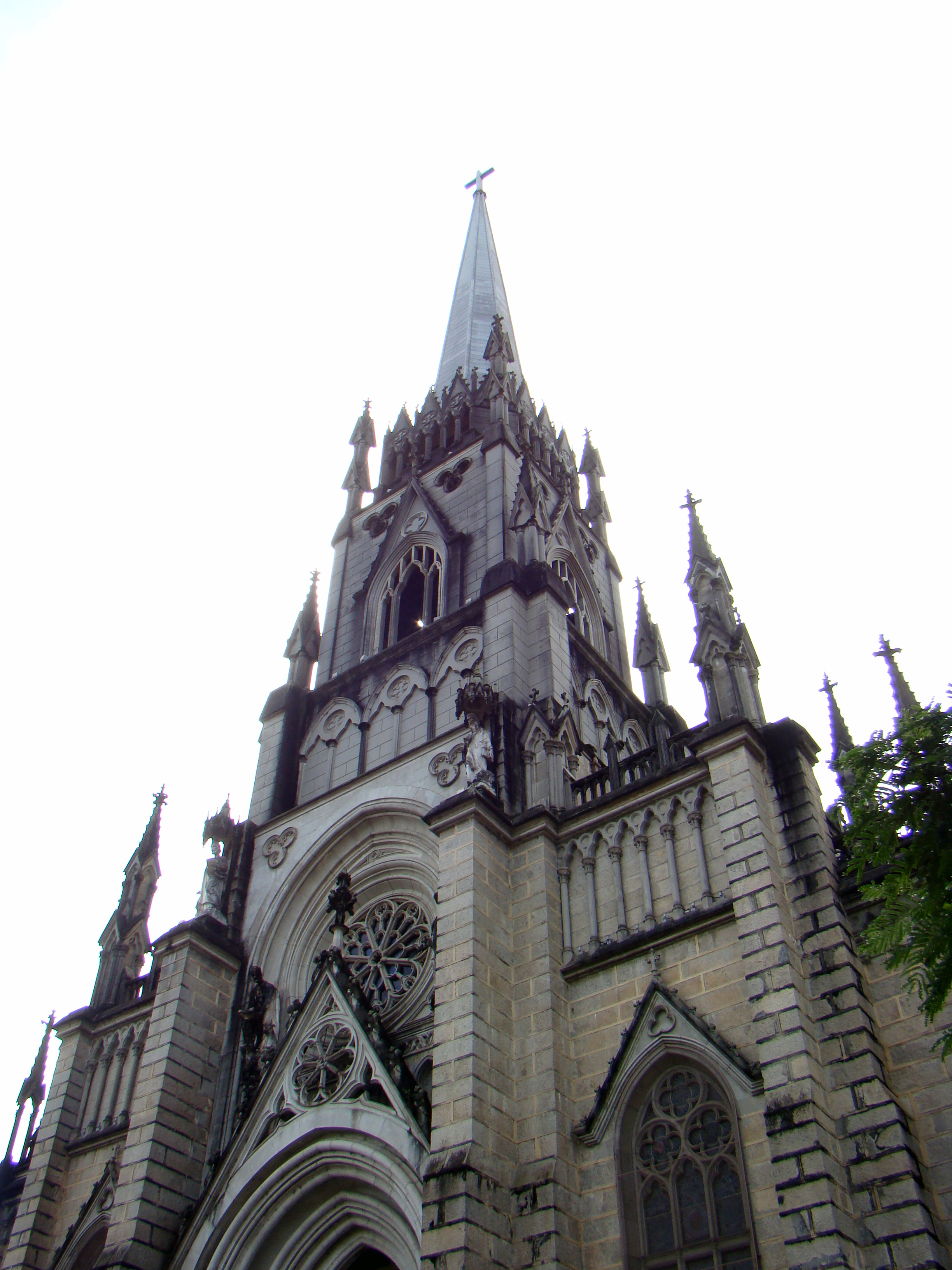 "Cidade Imperial":PETROPOLIS, RJ, Brasil.